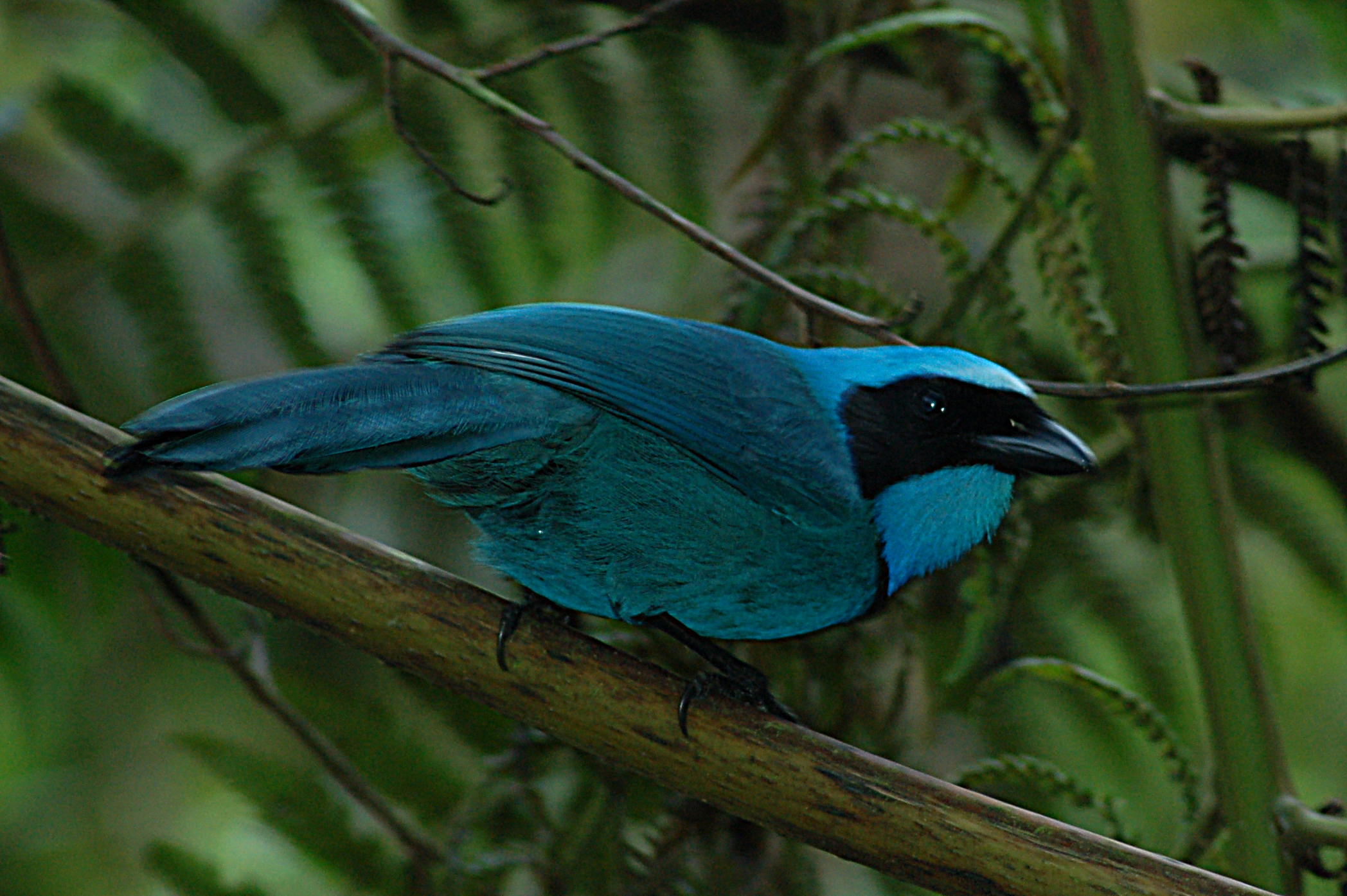 Turquoise Jay (Cyanolyca turcosa) - 11 June 2016 - Guango Lodge, Napo Province, Ecuador